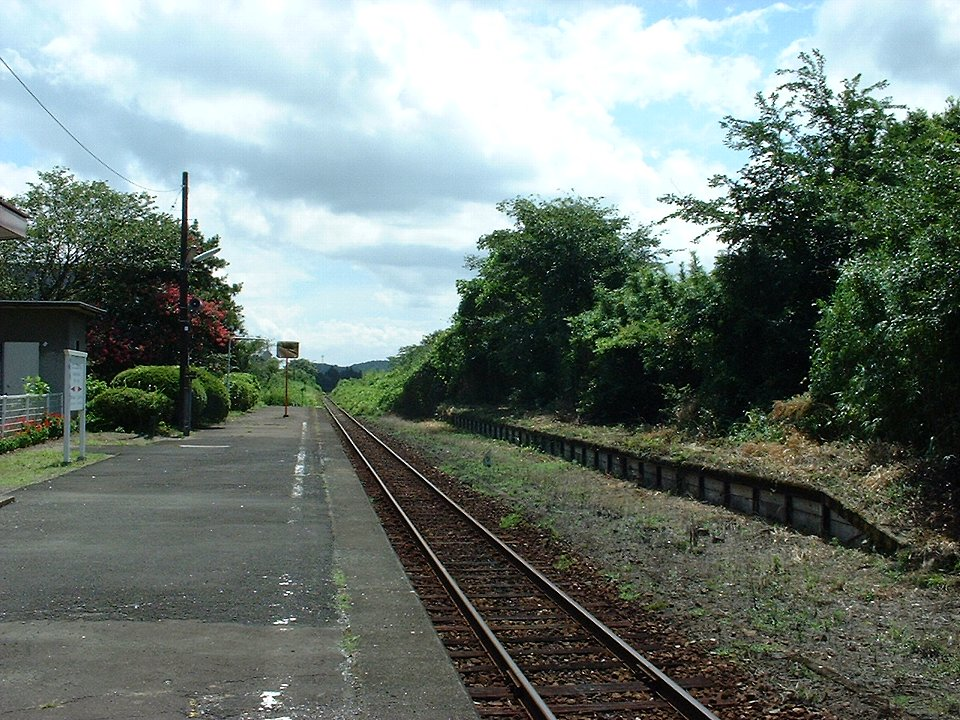 西小林駅ホーム 向い側に廃ホームが残る